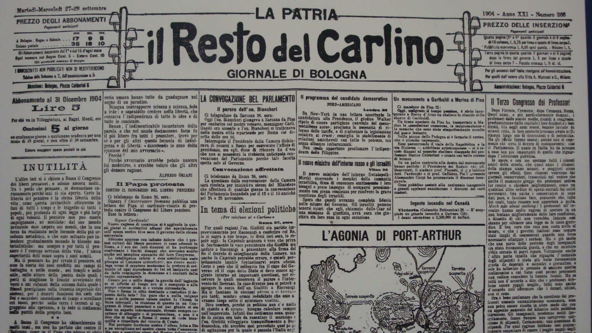 Prima pagina de il Resto del Carlino del 27 settembre 1904 (Anno XXI).